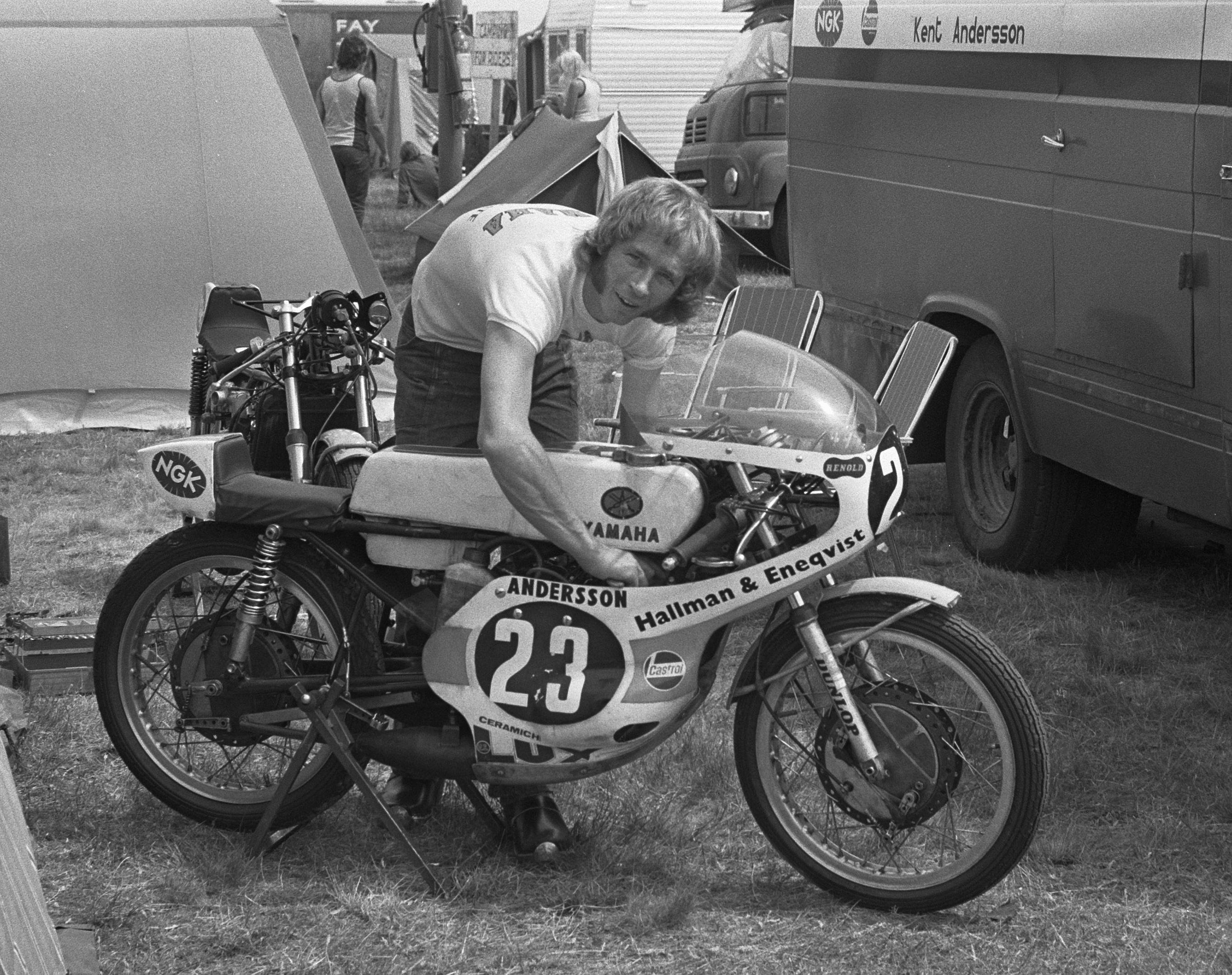 Training TT Assen, nummer 7 Andersson (kop)